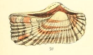 Arca navicularis Bruguière, 1789, Arcidae, Bivalvia, from Lovell Augustus Reeve: Conchologia Iconica, or, Illustrations of the Shells of Molluscous Animals. Vol. 2, London, Reeve Brothers, 1843-1844, pl 11 fig 70